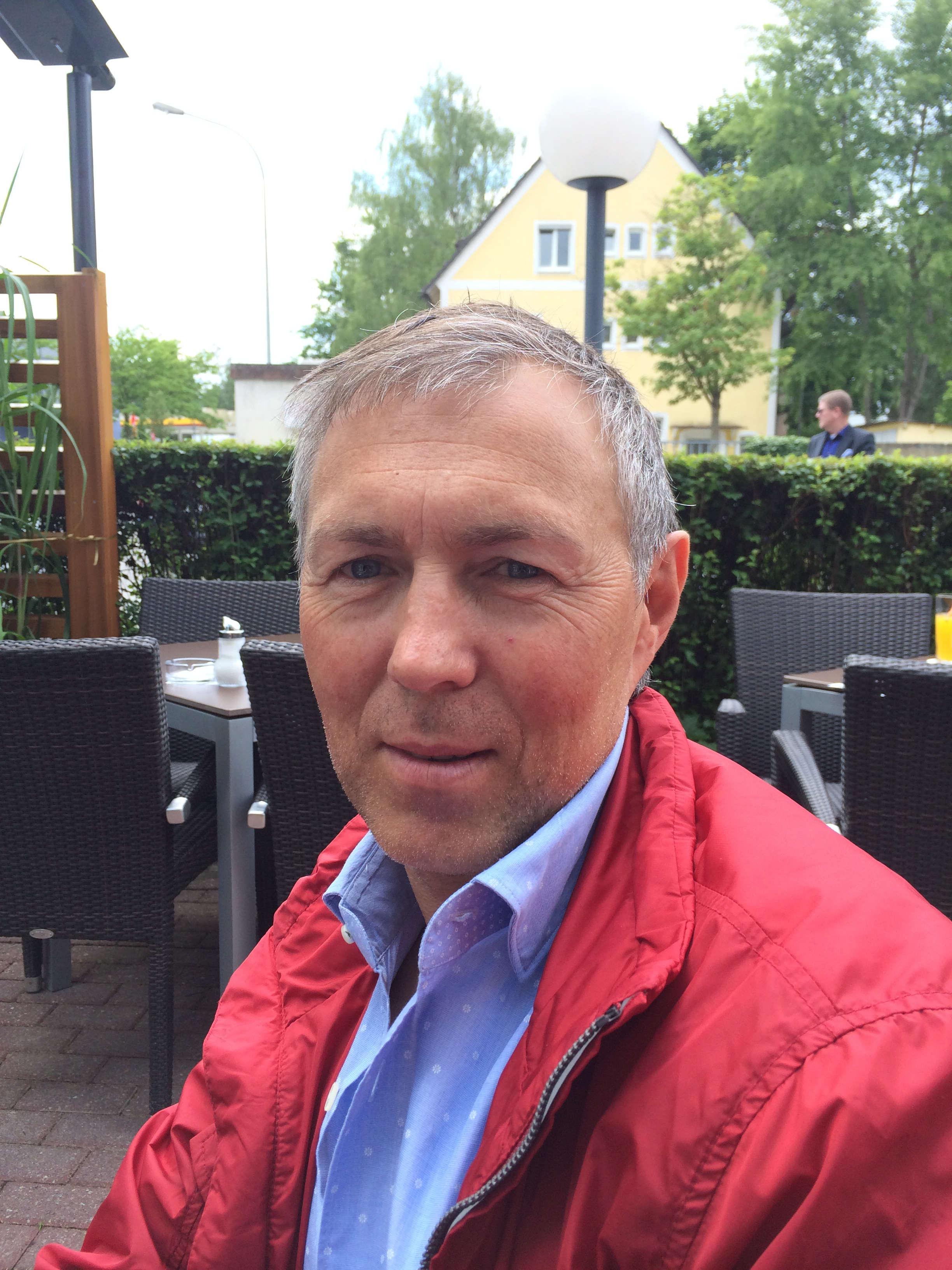 Trainer Jürgen Press